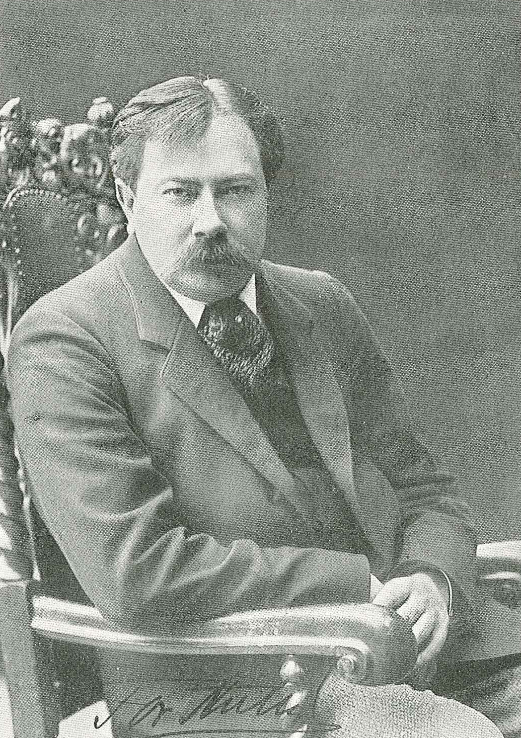 Tor Aulin (1866-1914), svensk kompositör, violinist och dirigent.